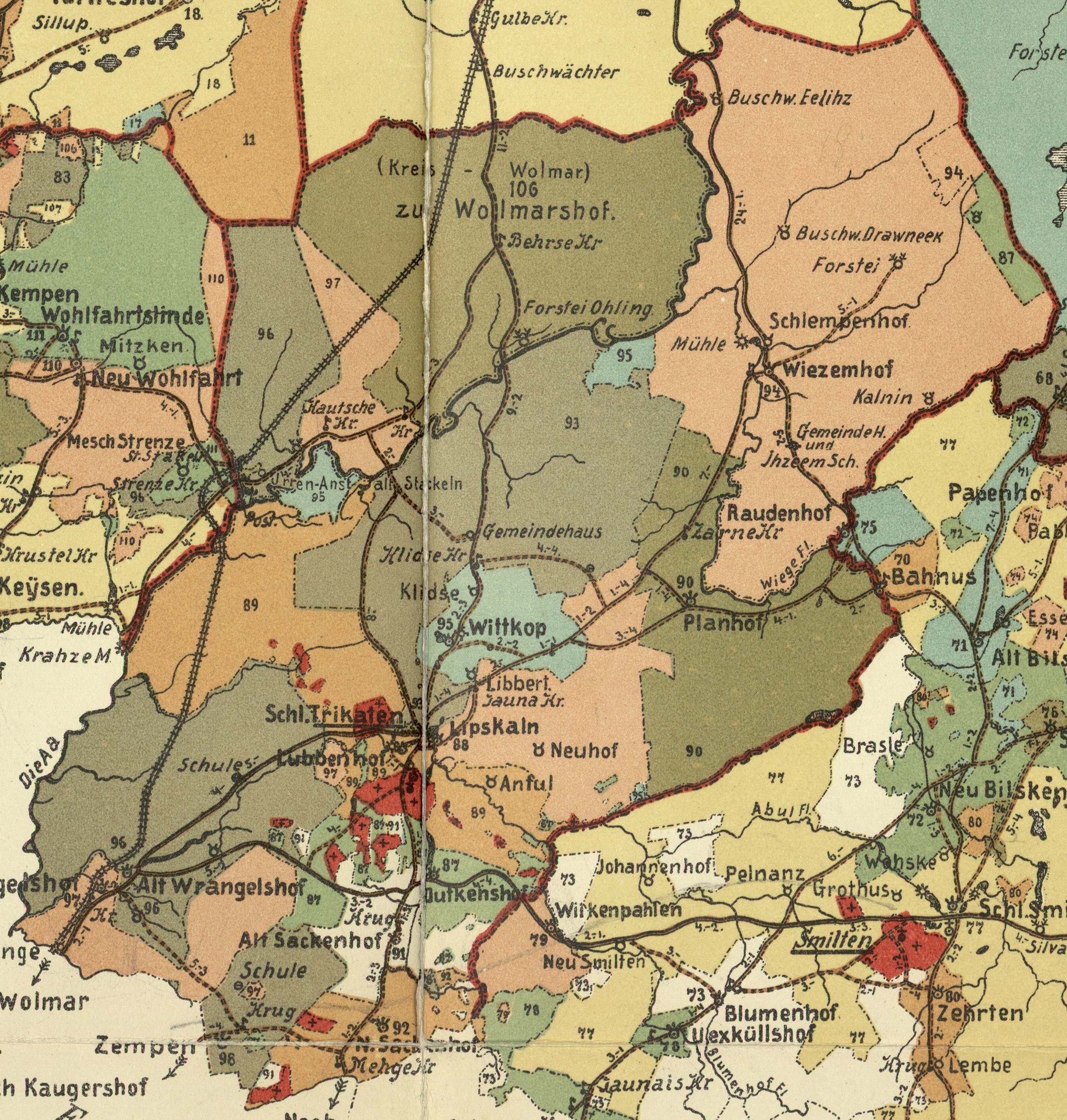 Trikāta kihelkonna mõisad 1904. aasta kaardil.